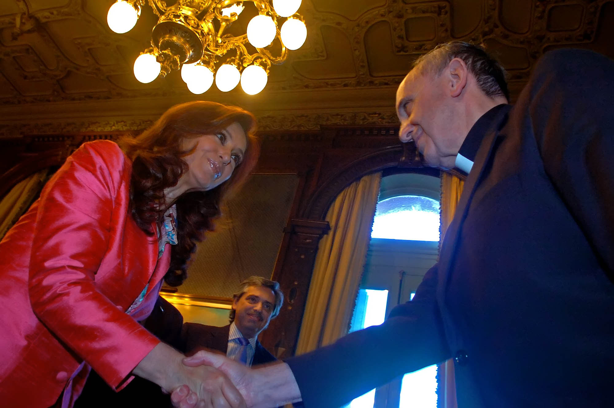 La presidenta Cristina Fernández de Kirchner recibe al arzobispo Jorge Bergoglio.